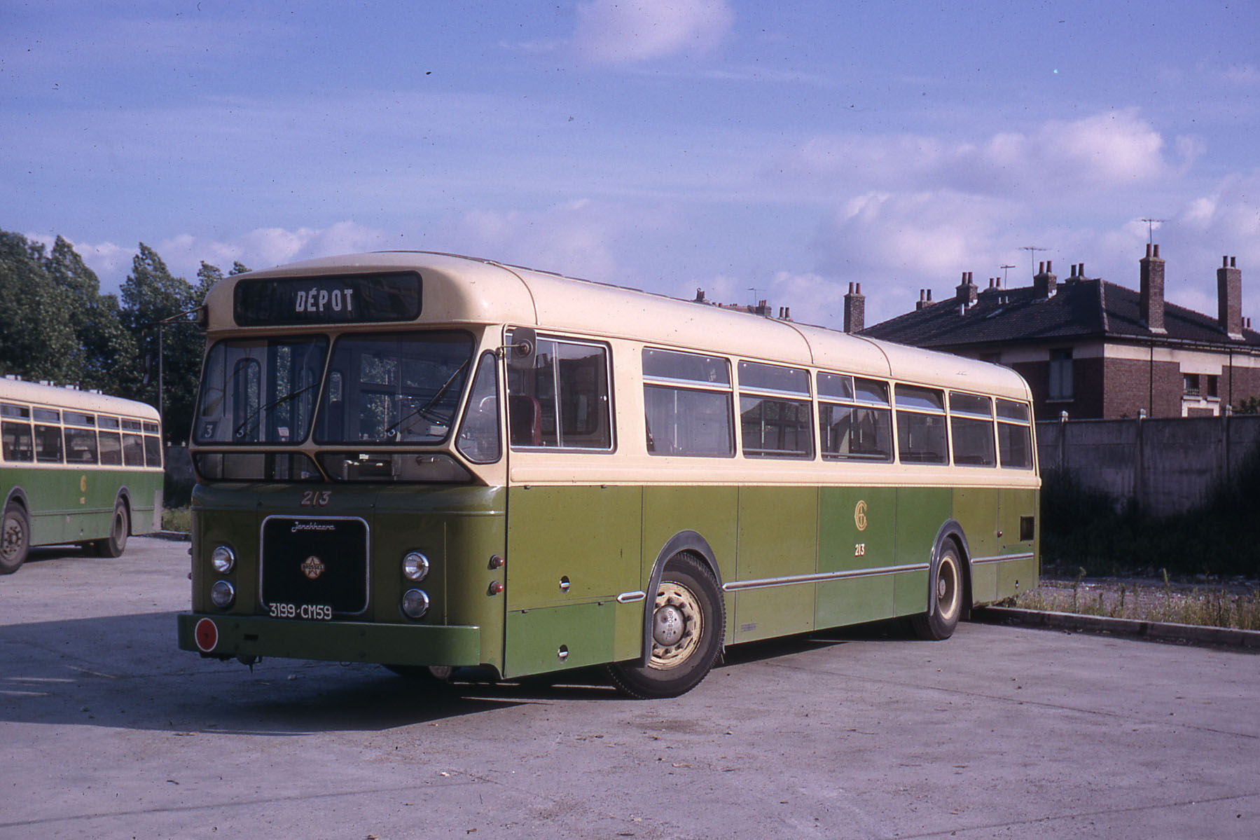 Autobus Brossel A92 DAR-L/1 de la CGIT (série 201-225) au dépôt Vauban à Lille. On aperçoit à l'avant droit, dans le sens de la marche, un disque rouge apposé sur le pare-chocs. C'est l'une des conséquences de l'application du décret-loi d'avril 1934, portant sur la coordination du transport rail-route en France. Ces dispositions sont prises afin de réglementer la cohabitation entre 2 modes de déplacement présents sur les mêmes itinéraires, d'où concurrence potentiellement déloyale et doublons inutiles. Restrictions budgétaires et course à la rentabilité ne datent pas d'hier ! L'objectif est aussi de clarifier les relations entre donneur d'ordres, en d'autres termes les collectivités comme les communes, départements... et l'exploitant-transporteur en bout de chaine. Concrètement un code de repérage comportant 6 couleurs est mis en place, dont: bleu - commande exceptionnelle, par ex. lors de dépassement des capacités de transport habituelles de l'exploitant (inscrites au plan départemental) jaune - trajets occasionnels dans un rayon de 10 km autour du siège de l'entreprise rouge - services réguliers et ouvriers, ramassage scolaire vert - occasionnel, excursions (voyages à la place) ce système perdure 40 ans, jusqu’à son abolition à l’automne 74.